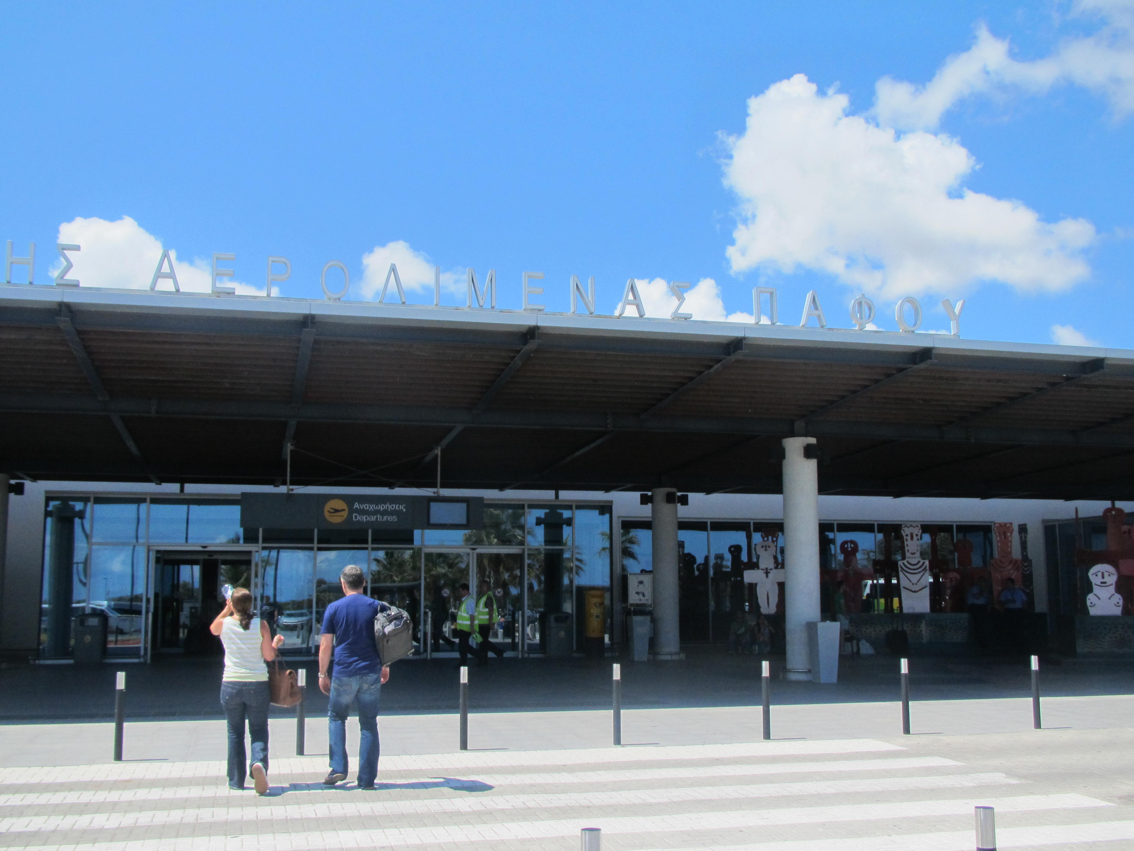 Paphos International Airport by Paride